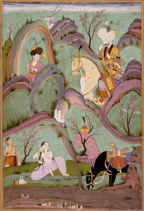 Deccan miniature